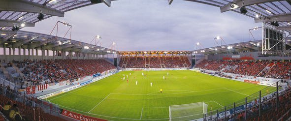 Stadion Eröffnung Offenbach – Sparda-Bank-Stadion